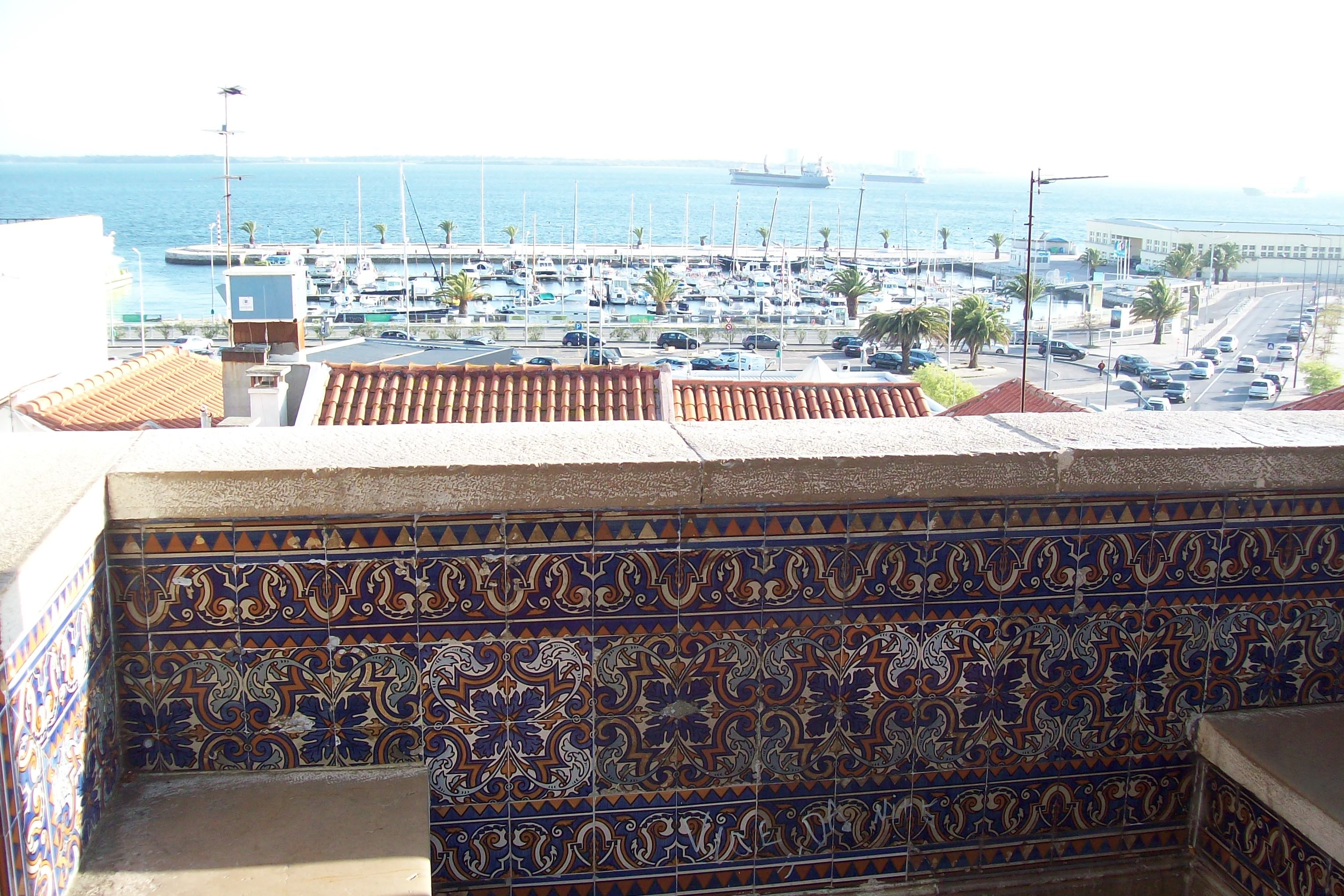 Miradouro das Fontaínhas - Vista para o Porto de Setúbal